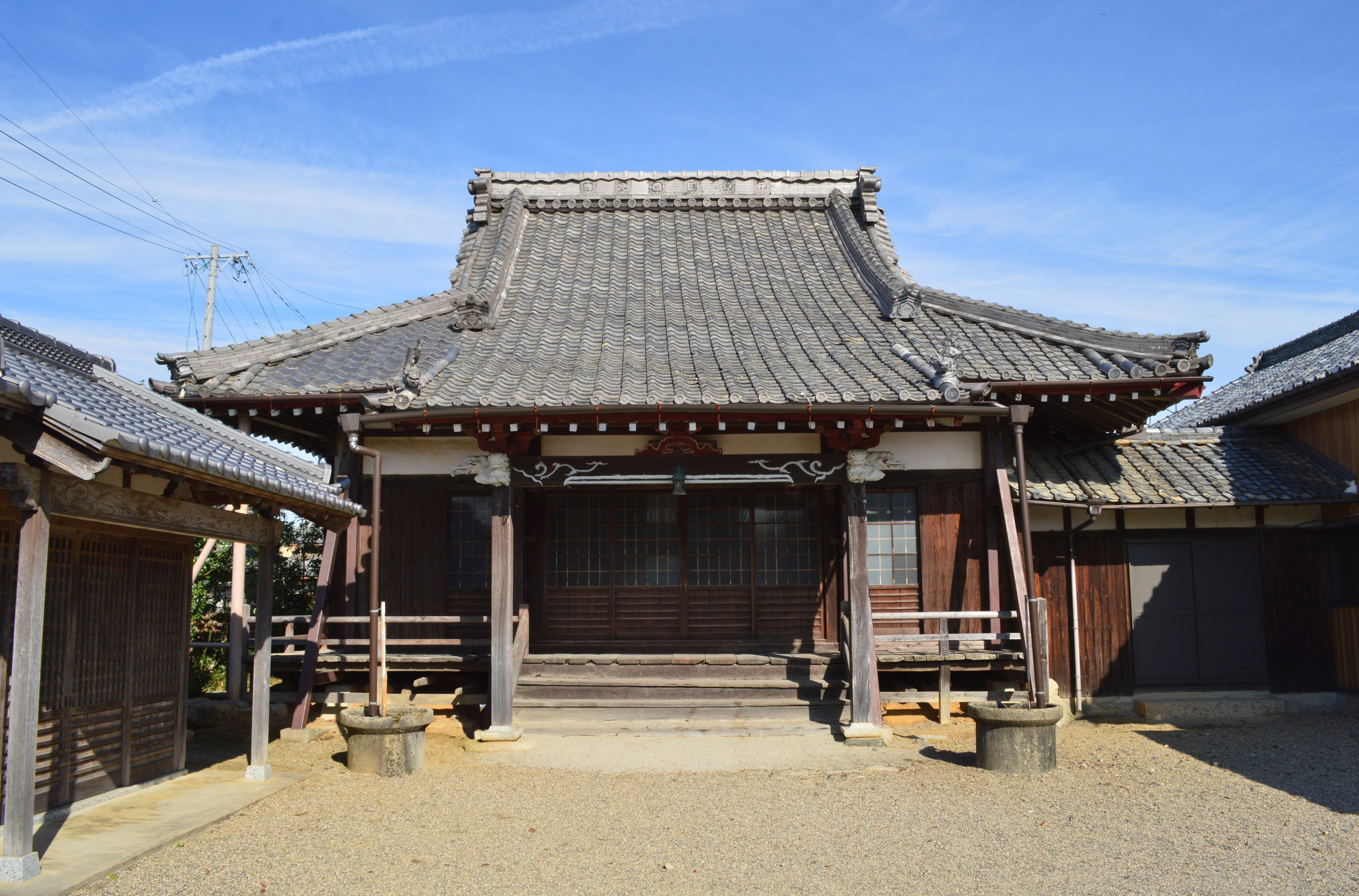 常慶山金光明院国分寺 本堂